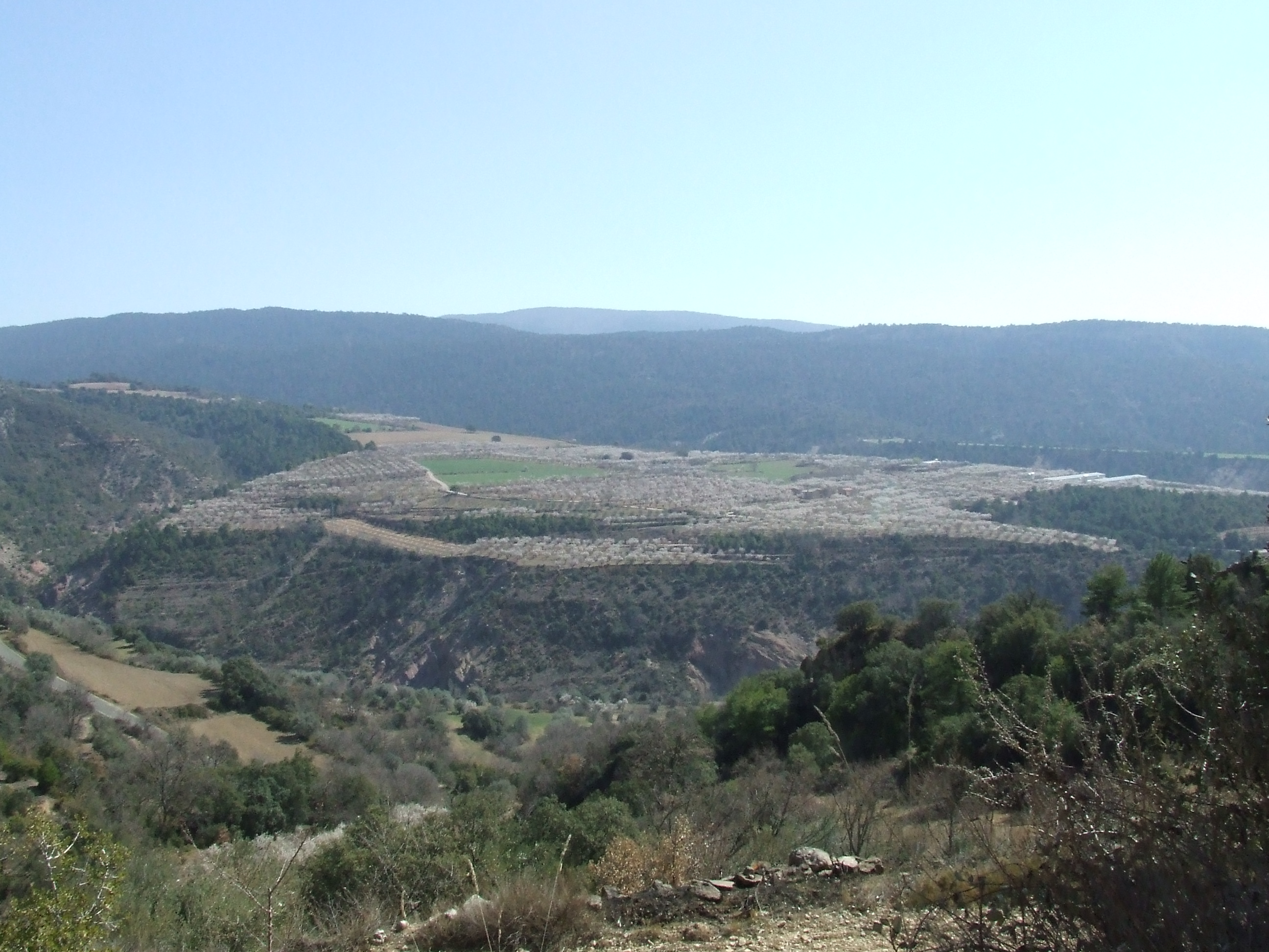 Los Planers (Abella de la Conca, Pallars Jussà)